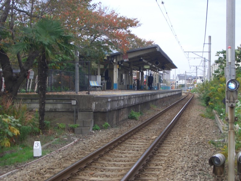 Kagawa Station on JR Sagami Line, Chigasaki, Kanagawa 香川駅